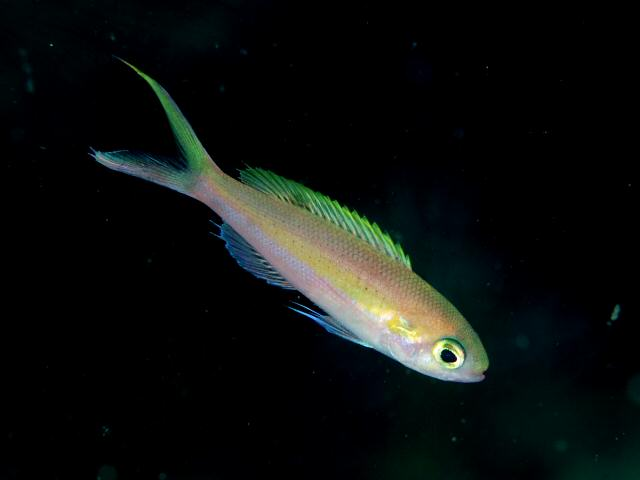 カワリハナダイ Symphysanodon katayamai